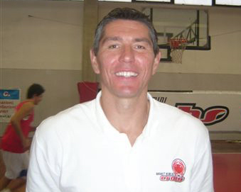 Gordan Firic al lavoro con il Basket Rimini Crabs.